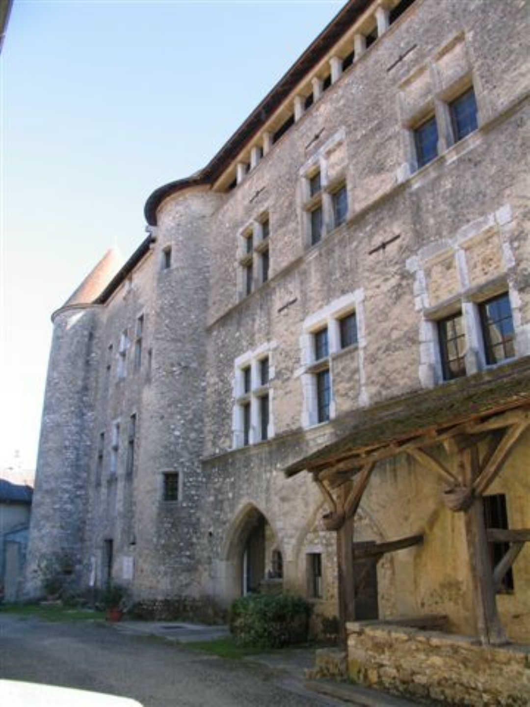 Photo du Château de Sainte-Julie